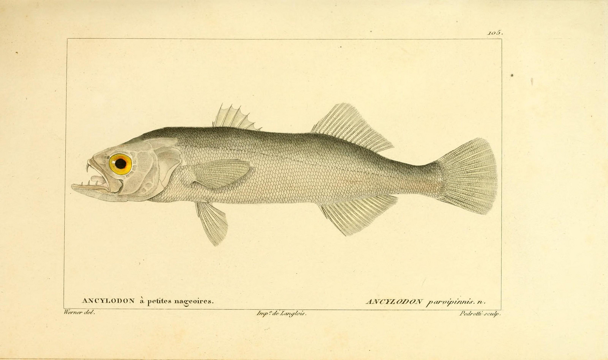 Isopisthus parvipinnis syn. Ancylodon parvipinnisHistoire naturelle des poissons /. Paris :Chez F. G. Levrault,1828-1849..